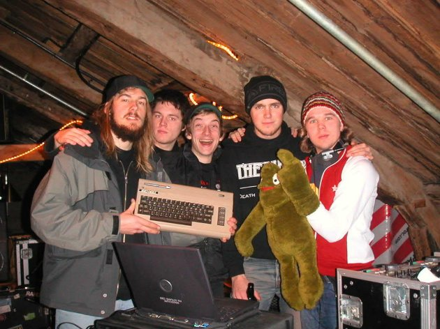 Hardcore/punk-gruppen "Totalt Jävla Mörker" möter Thomas "Sol" Sunhede från radioprogammet Syntax Error på puben Effes i Visby 2002 där båda parter spelade samma kväll. Inge fattas på bilden.